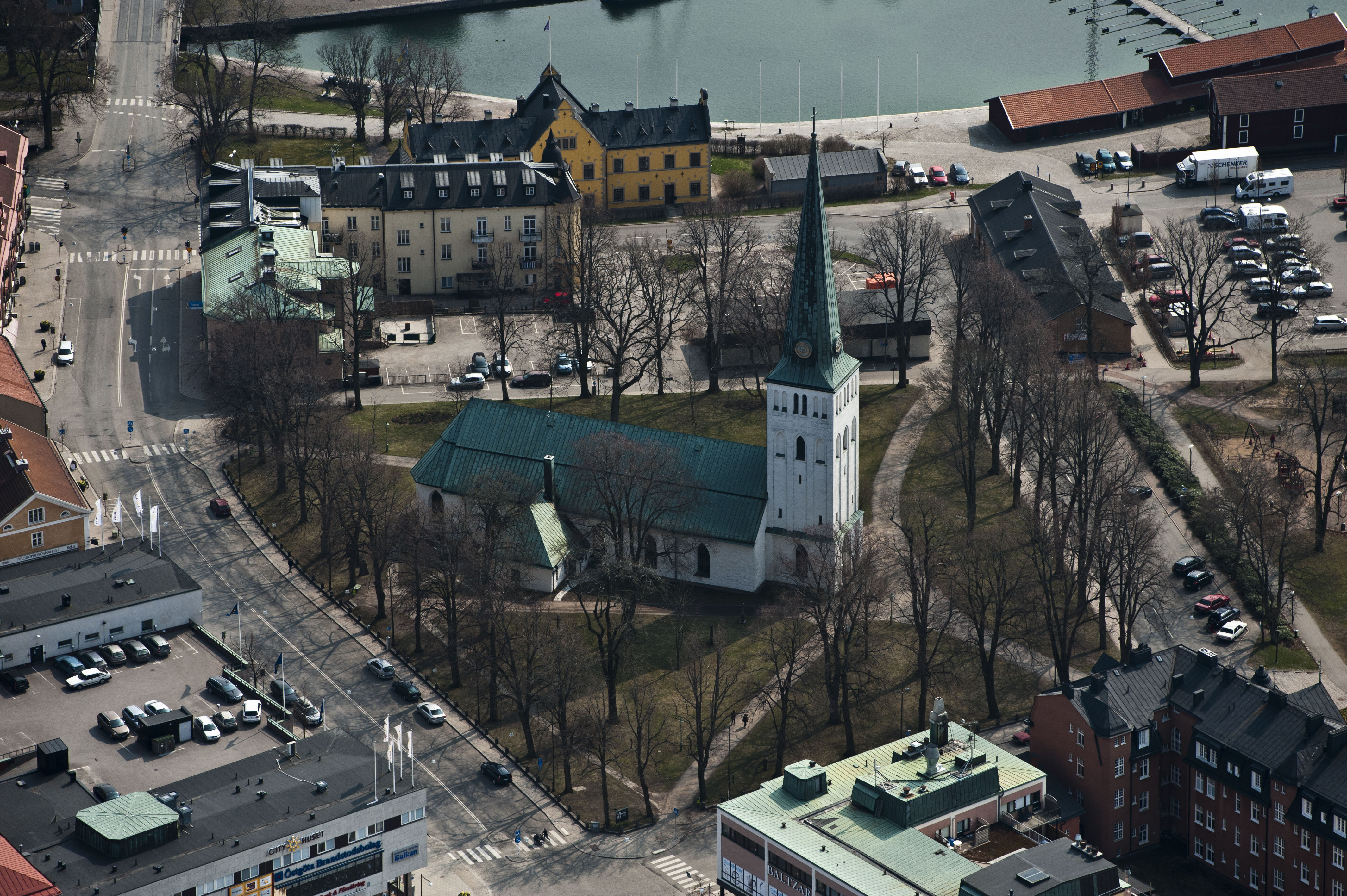 Motala ka